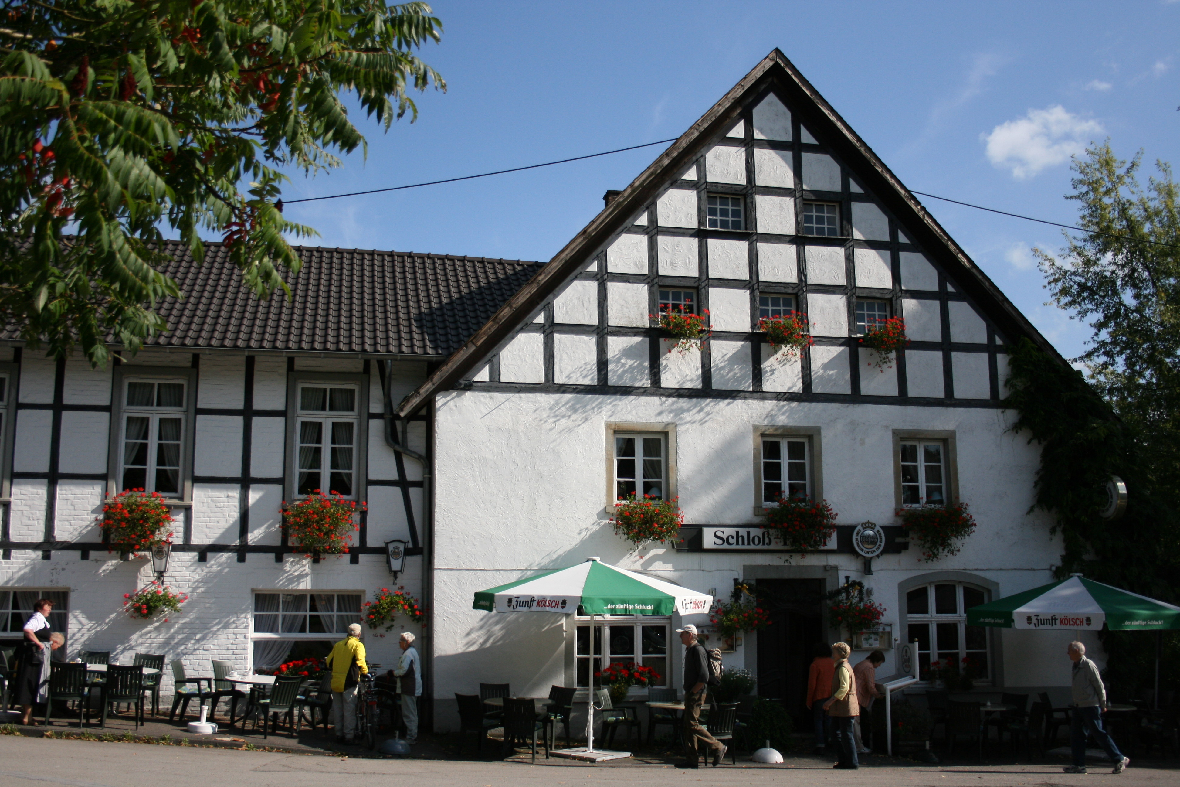 Marienheide-Gimborn